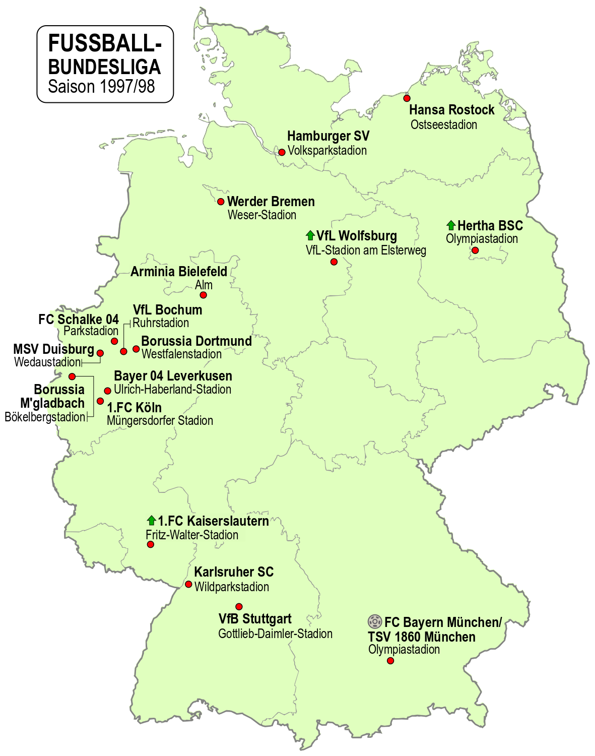 Karte der Vereine der Fussball-Bundesliga-Saison 1997/98